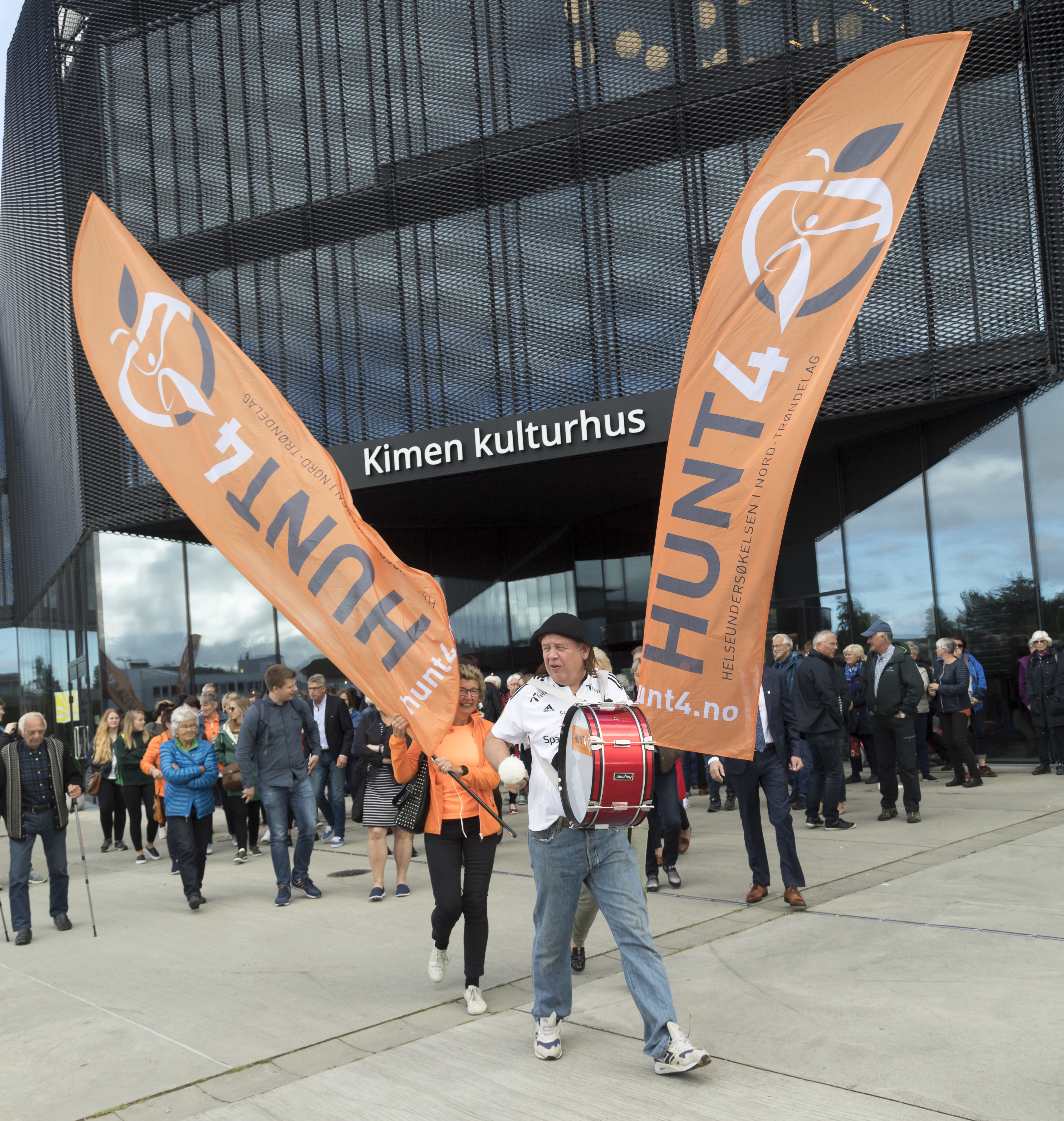 Stjørdal 01.09.2017 : Kick-off for HUNT 4, Helseundersøkelsen i Nord-Trøndelag. Show i Kimen kulturhus.